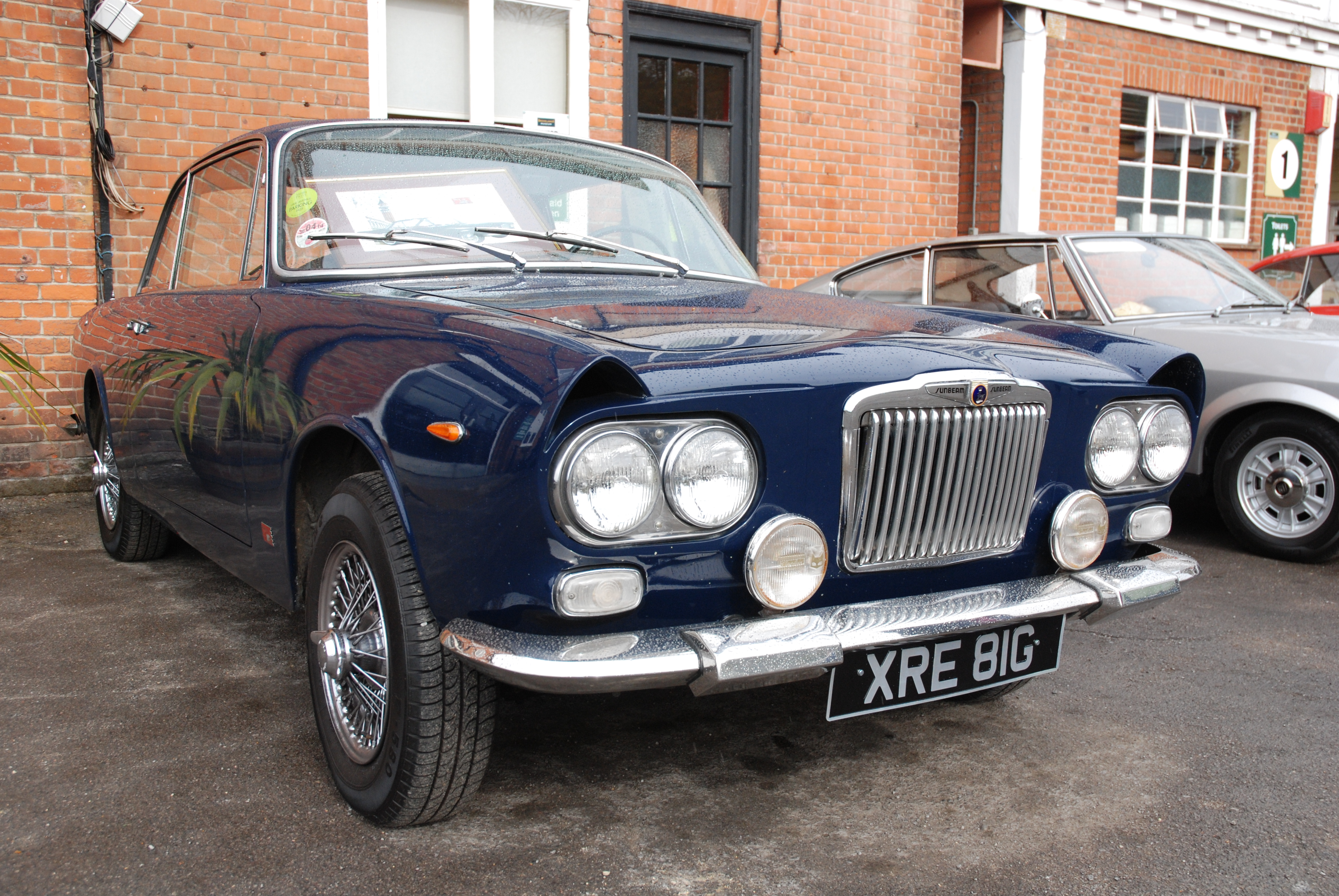 Auto Italia,Brooklands,May2013